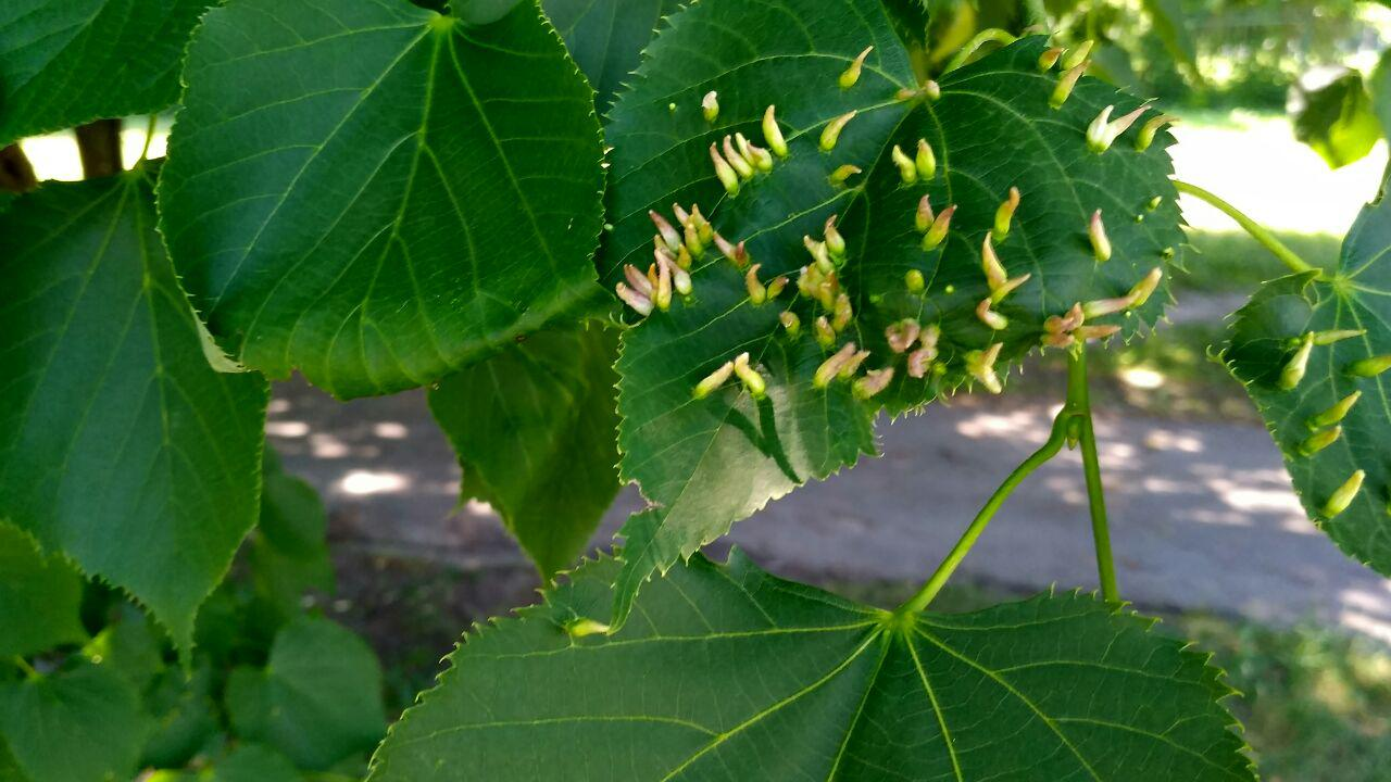 Галлы галлового клеща.